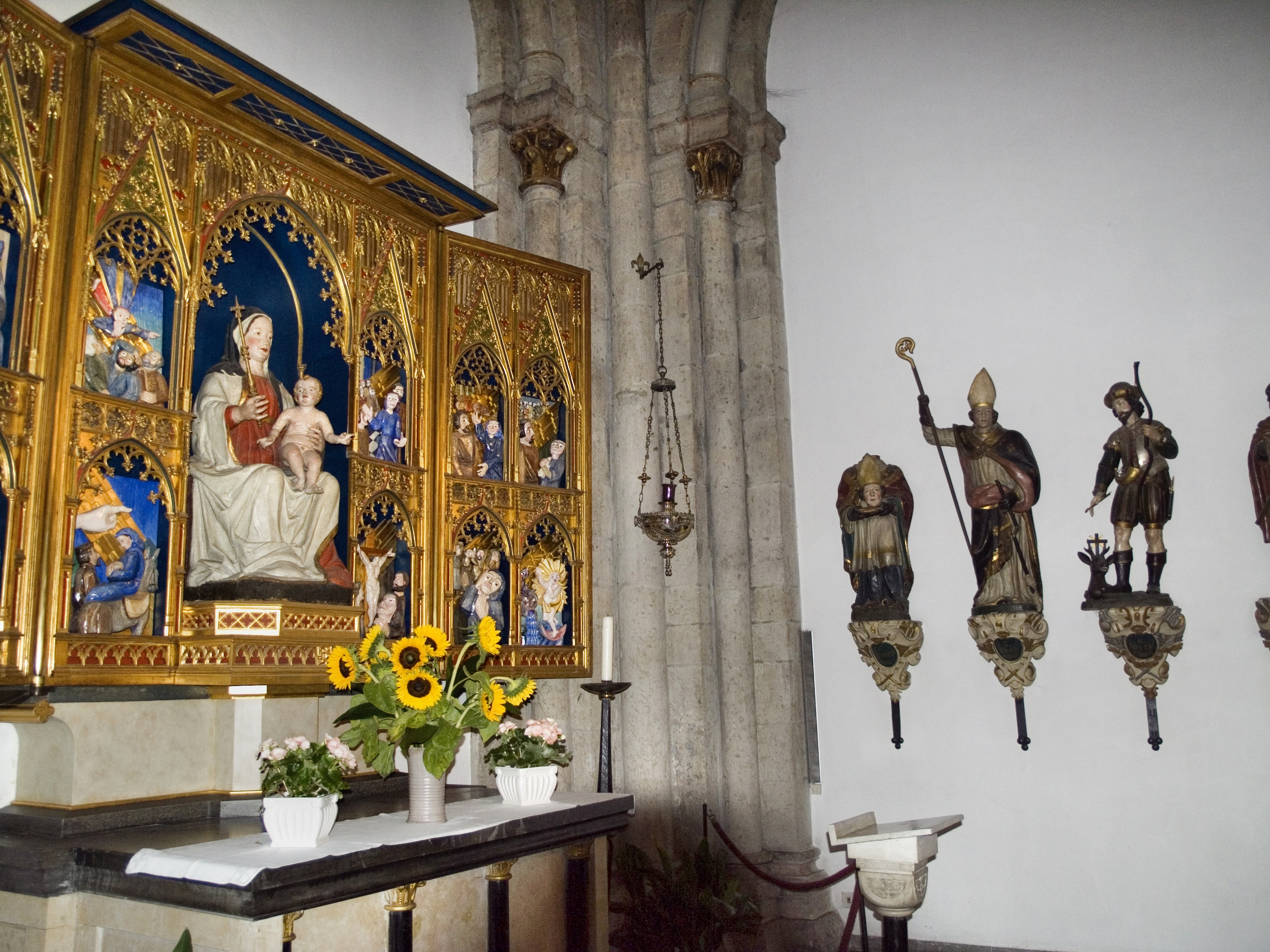 Северный Рейн-Вестфалия, Кёльн - Апостольская церковь